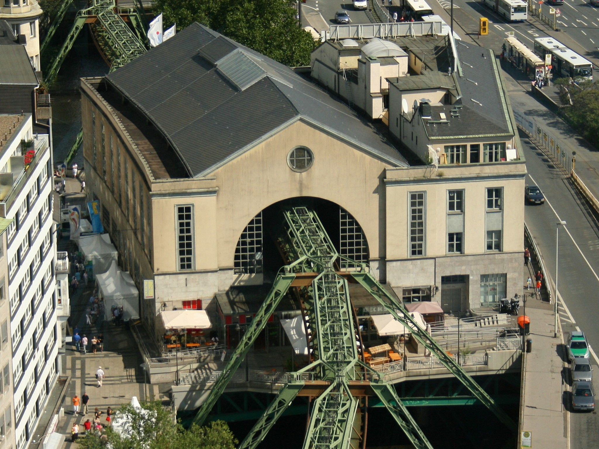 Blick von der 19. Etage des Sparkassenturms beim NRW-Tag in Wuppertal